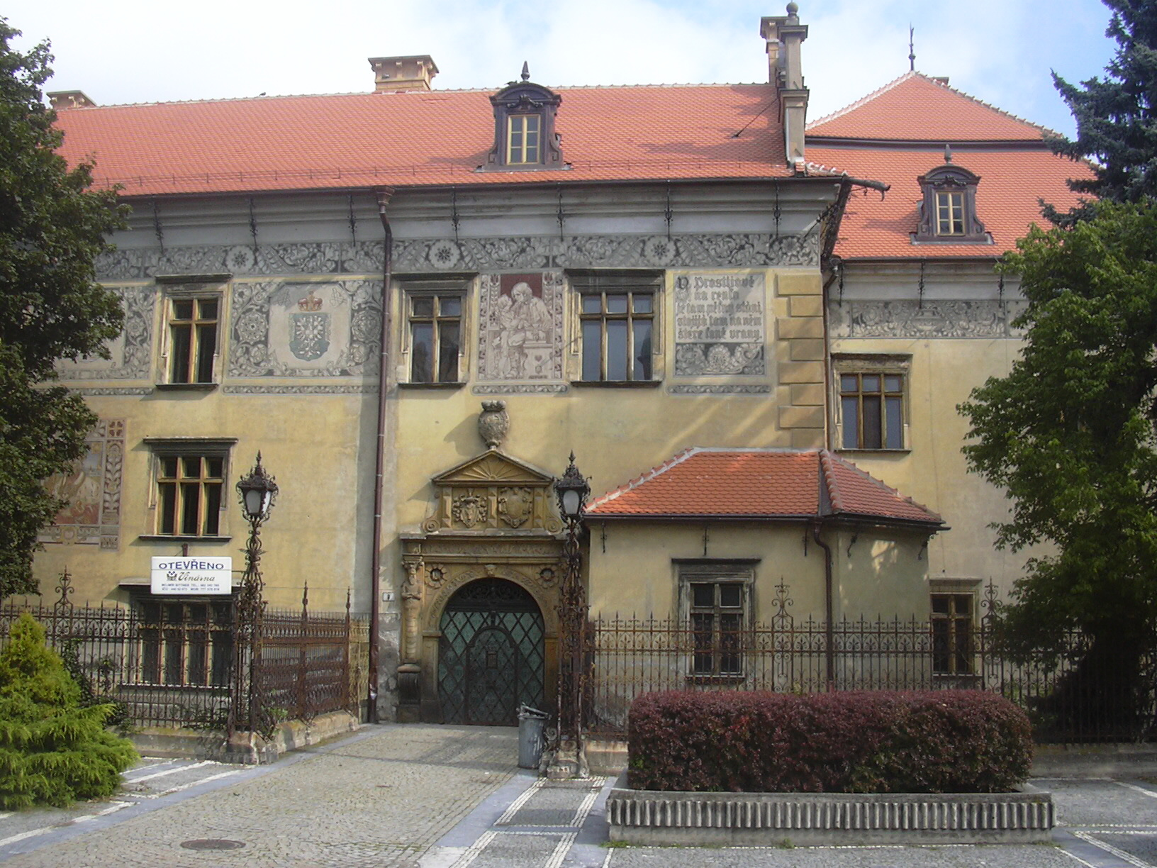 Prostějovský zámek (Prostějov - Czech Republic)